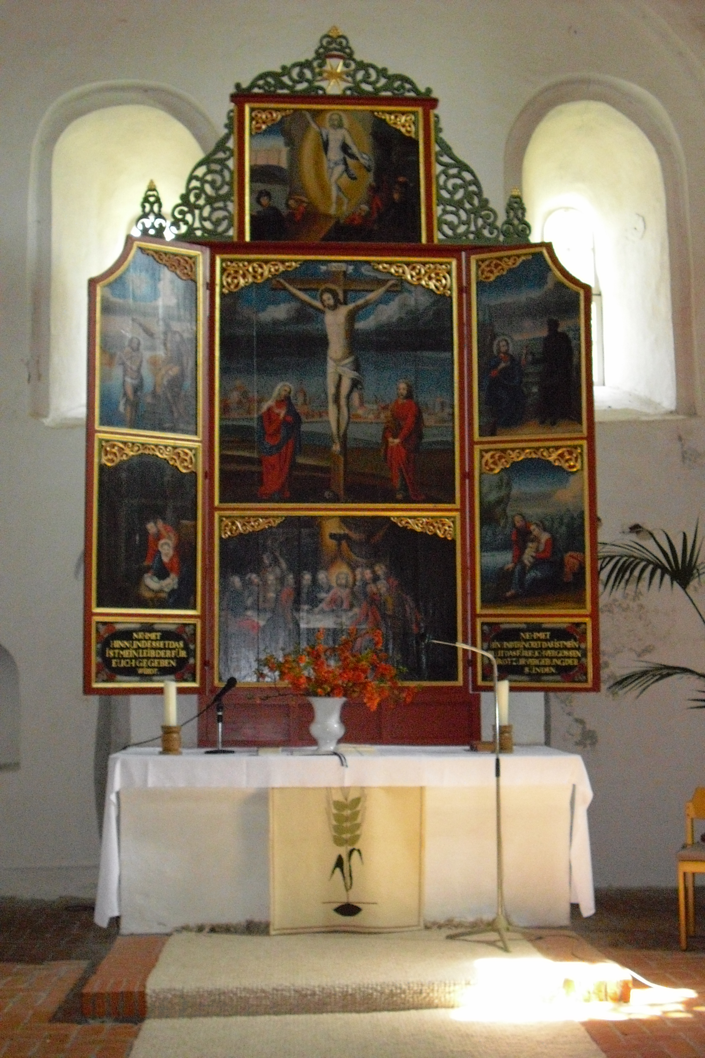 Barockaltar der evangelischen Kirche Westochtersum